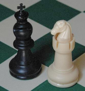 New pieces for Capablanca chess (the Archbishop and Chancellor), designed by Matt Hucke 2004, built from readily available plastic standard pieces using handheld cutting tool and glue. Arcebispo e Chanceler, peças do Xadrez de Capablanca (também usadas no Xadrez Gótico de Ed Trice), segundo a concepção do wikipedista Matt Hucke (2004), montadas a partir de peças comuns de xadrez com o uso de instrumento cortante e cola.